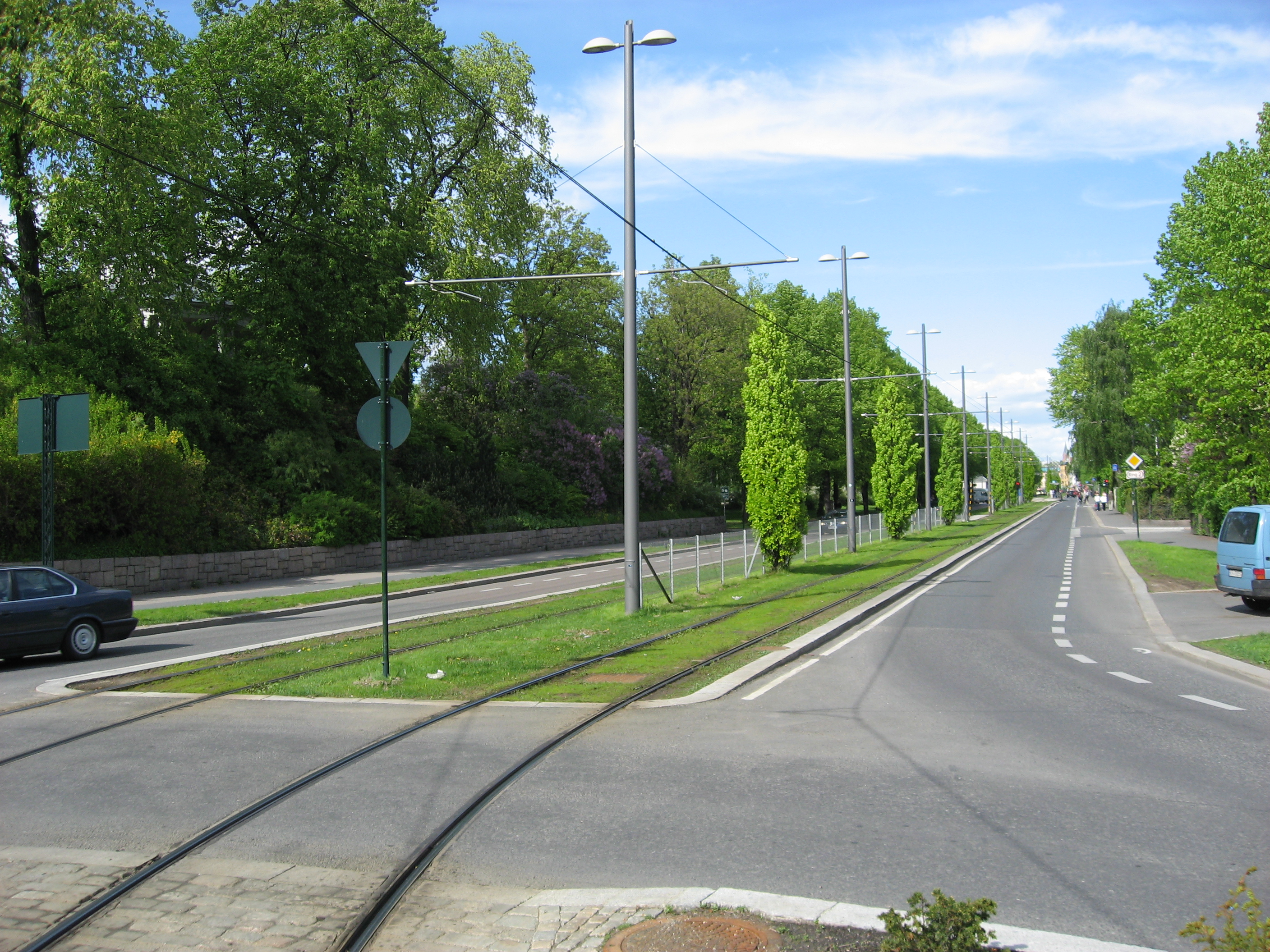 Kirkeveien in Oslo from its end at Frogner plass